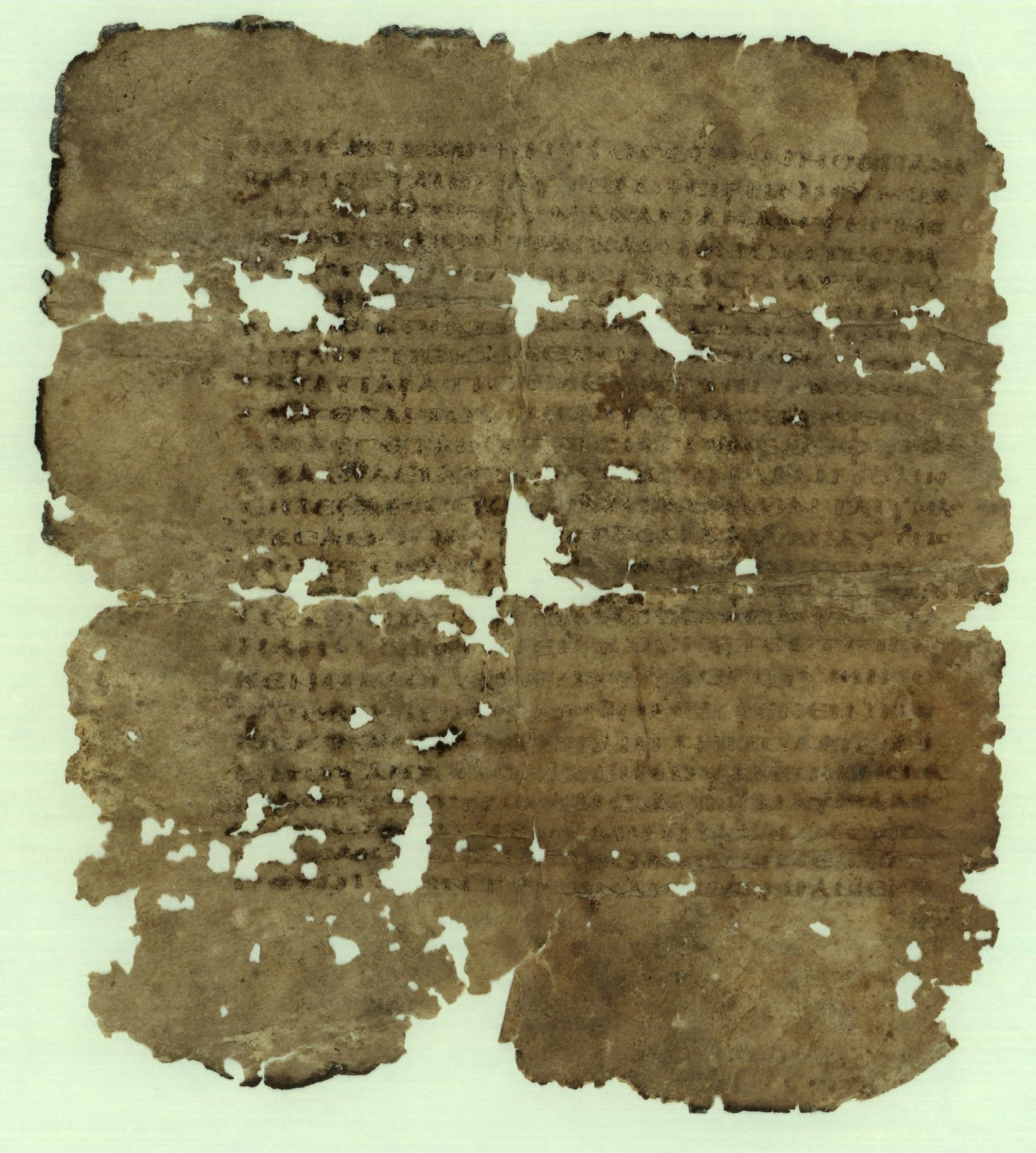 side verso of the fragment with the text of Luke 10:6-14